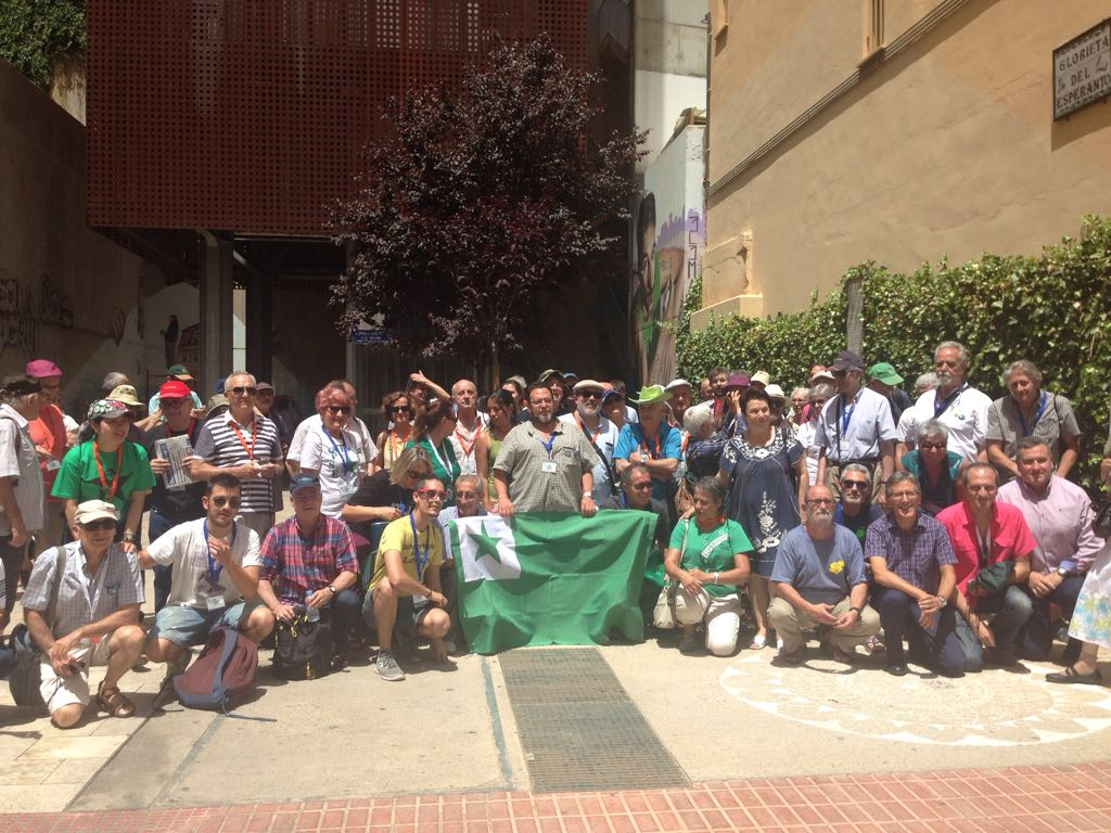 Inauxguro placeto Esperanto